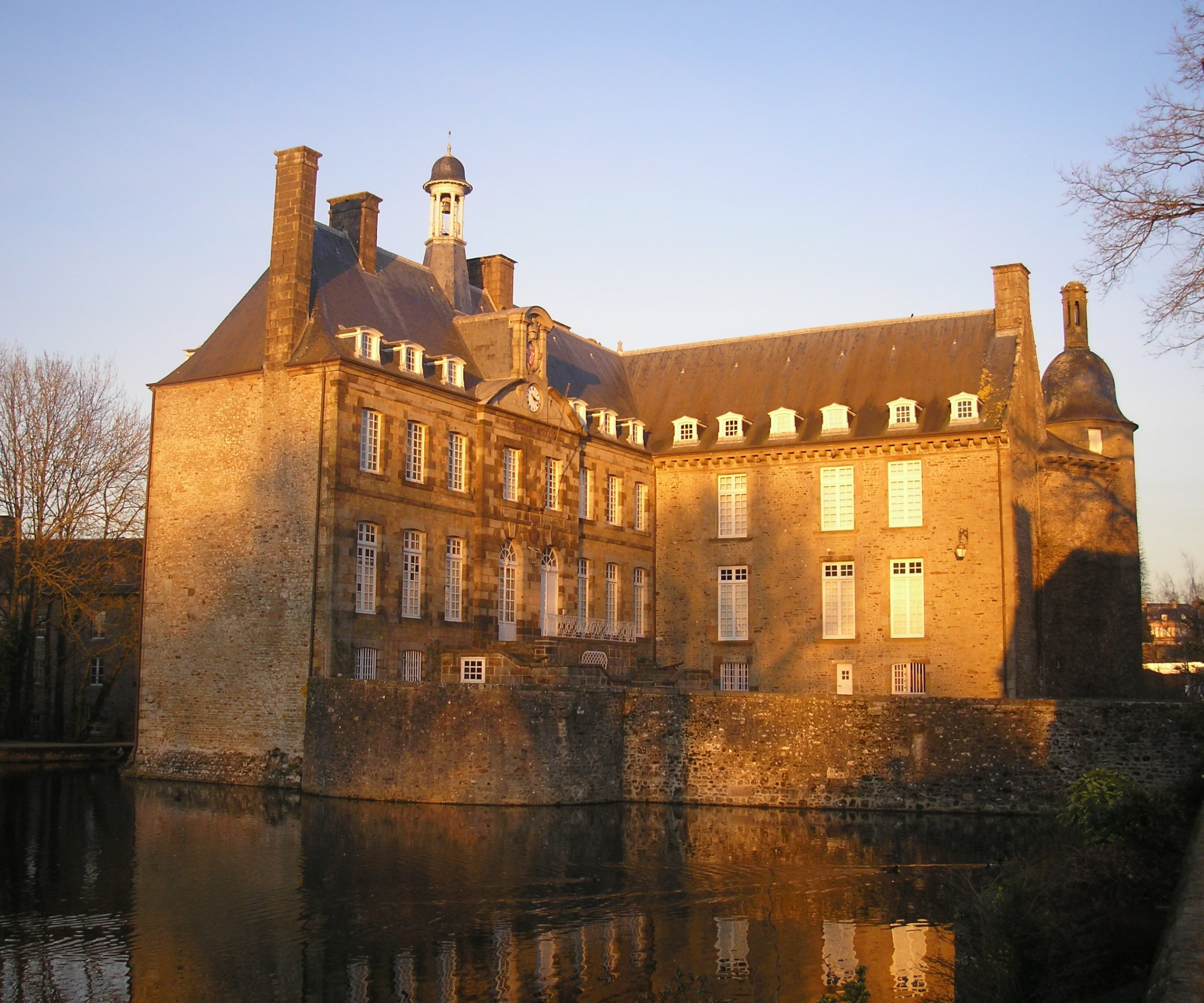 Flers (Normandie, France). Le château (arrière).